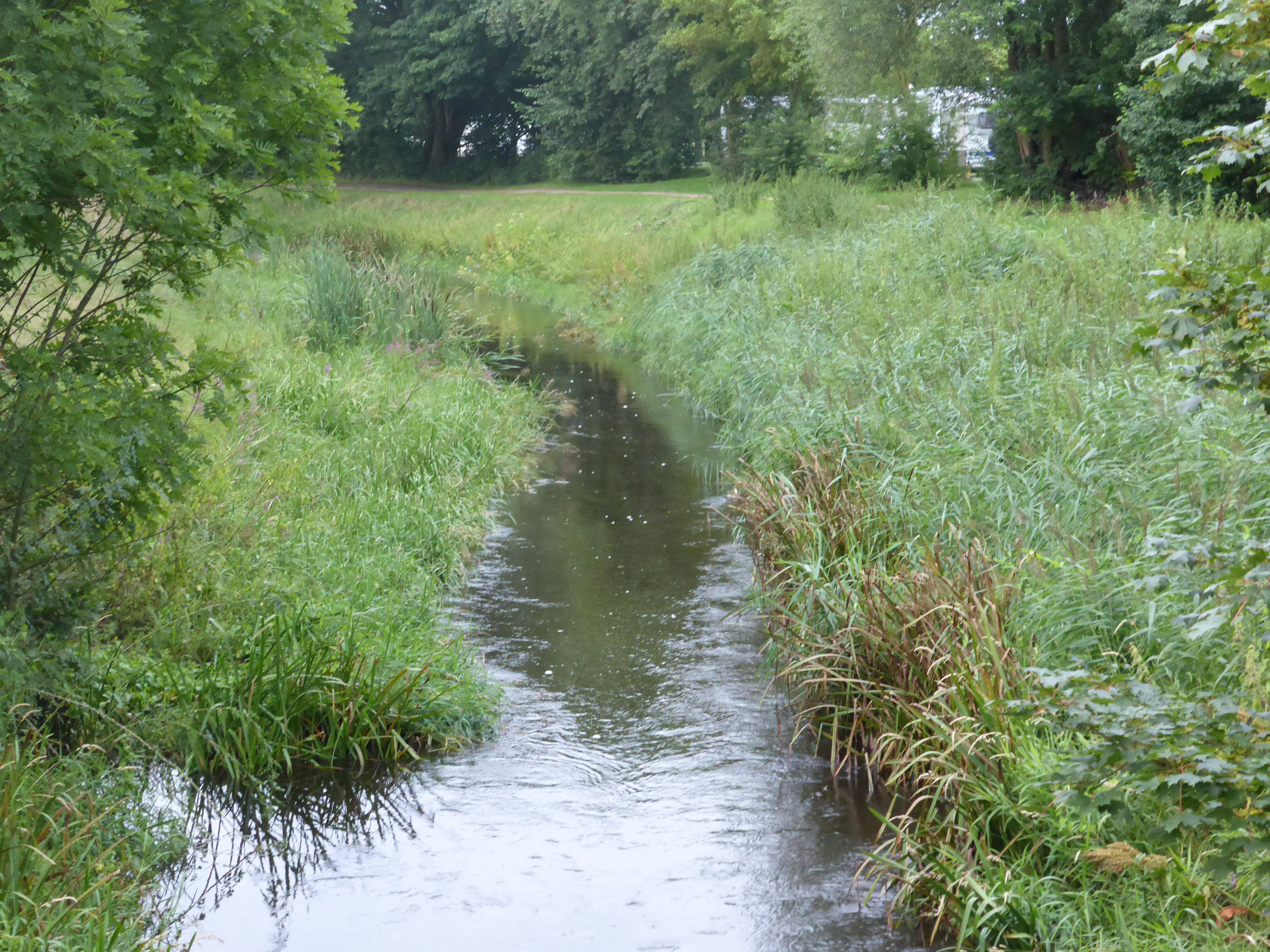 Die südliche Aller an der Konrad-Adenauer-Straße in Gifhorn